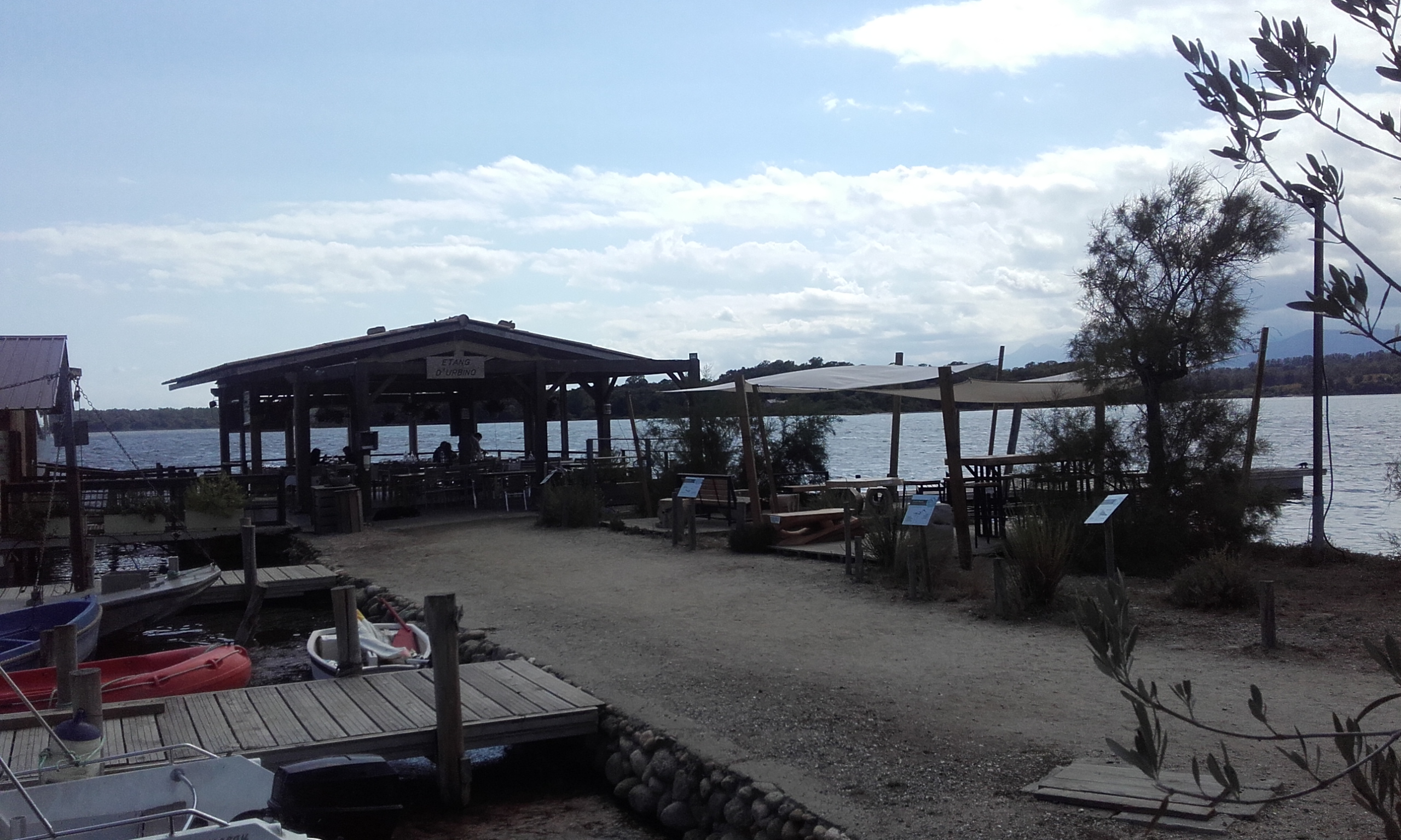 L'étang d'Urbino (Haute-Corse) : le restaurant de moules et poissons, installé à la pointe de la presqu'île, ouvert d'Avril à fin Septembre et tenu par une famille locale.